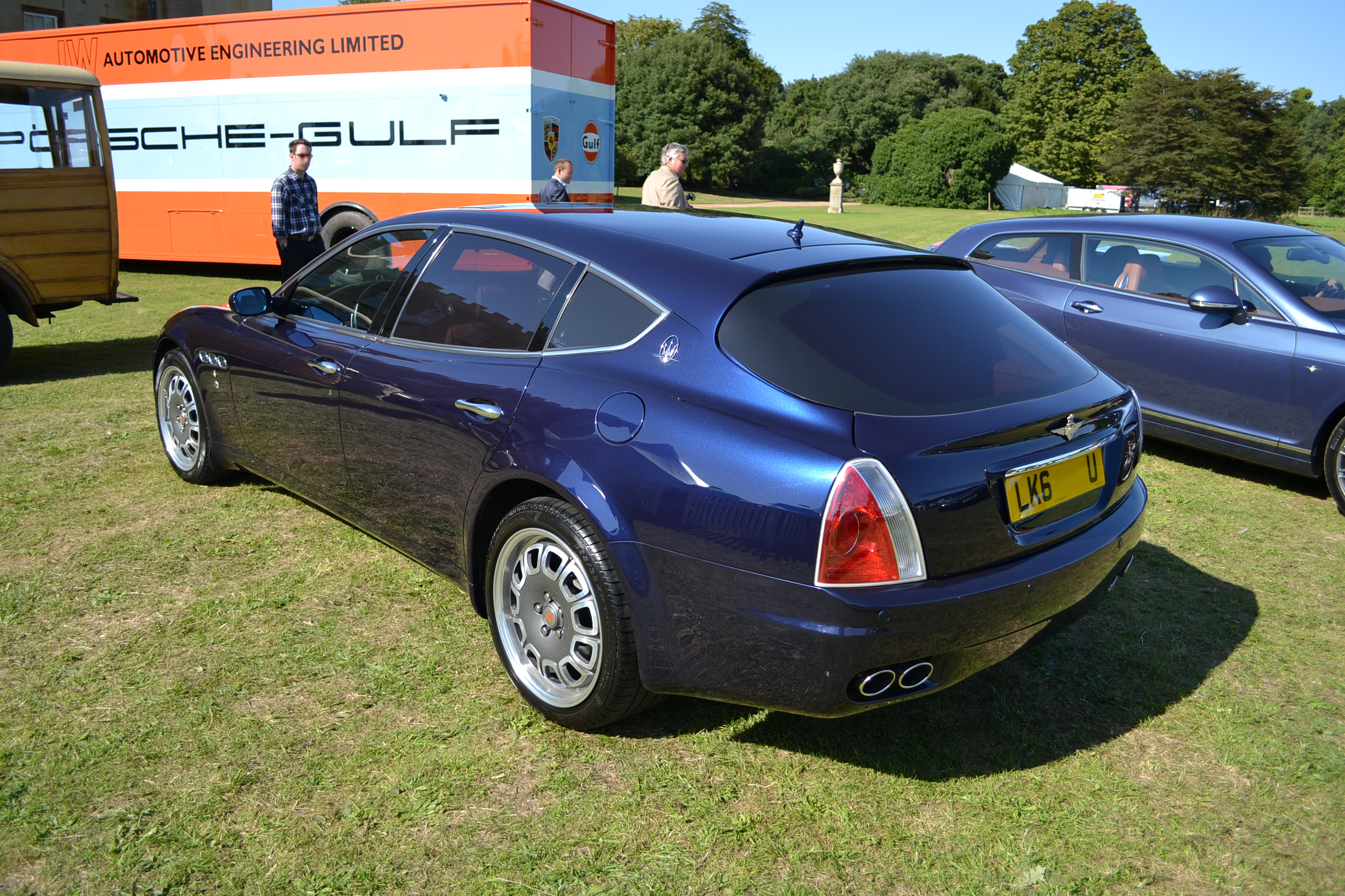 Salom Privé London 2012